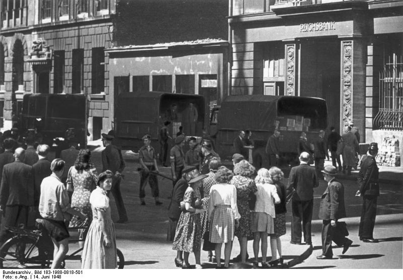 Das neue Geld in Hamburg eingetroffen? Unter strenger britischer bewachung wurden am Montag vormittag acht Lastkraftwagen mit Kisten vor dem gebäude der Hamburger Landeszentralbank abgeladen. der scharfe Absperrungsring um das Bankgebäude lässt vermuten, dass gegnwärtig das neue Geld in das Bankgebäude eingeliefert wird. Unser Bild zeigt das Ausladen der Kisten, unter englischer Bewachung vor der Hamburger Landeszentralbank. 1648-48